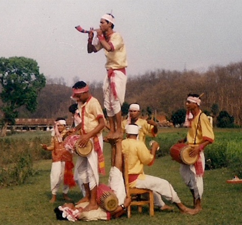 অসমীয়া: অসমৰ কোনো কোনো ঠাইত দলীয় বিহুৰ লগত কিছুমান অদ্ভূত কলাকৌশলৰ প্ৰদৰ্শন হয়..